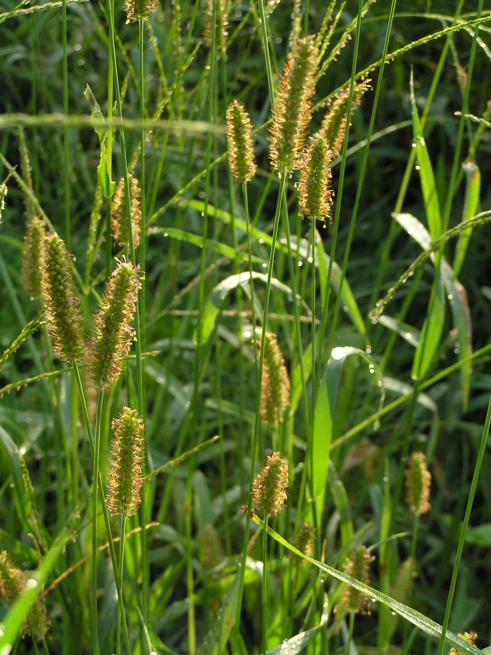 エノコログサ（Setaria viridis (L.) P.Beauv.）は、単子葉植物イネ科エノコログサ属の植物で、1年生草本である。ブラシのように毛の長い穂の形が独特な雑草である。 草丈は40-70cmになる。茎は細く、基部は少し地表を這い、節から根を下ろす。夏には茎が立ち上がって伸び、先端に穂をつける。葉は匍匐茎にも花茎にも多数ついており、最大20cm位、イネ科としてはやや幅広く、細長い楕円形、薄く、緑色でつやがない。茎を包む葉鞘と、葉身の境目につく葉舌は退化して、その部分に毛だけが残る。また、よく葉が裏表逆になっている。葉の付け根でねじれて、裏側が上を向くもので、そのような葉では、上を向いた裏側の方が濃い緑でつやがあり、下を向いた表側の方が、裏のような様子になる。 花序は円柱形で、一面に花がつき、多数の毛が突き出すので、外見はブラシ状になる。イヌビエなどの穂から出る毛は、小穂を包む鱗片（穎）の先端から伸びる芒であるが、エノコログサの場合、この毛は芒ではなく、小穂の柄から生じる長い突起である。 夏から秋にかけてつける花穂が、犬の尾に似ていることから、犬っころ草（いぬっころくさ）が転じてエノコログサという呼称になったとされ、漢字でも狗（犬）の尾の草と表記する。猫じゃらしの呼称は、花穂を猫の視界で振ると、猫がじゃれつくことから。